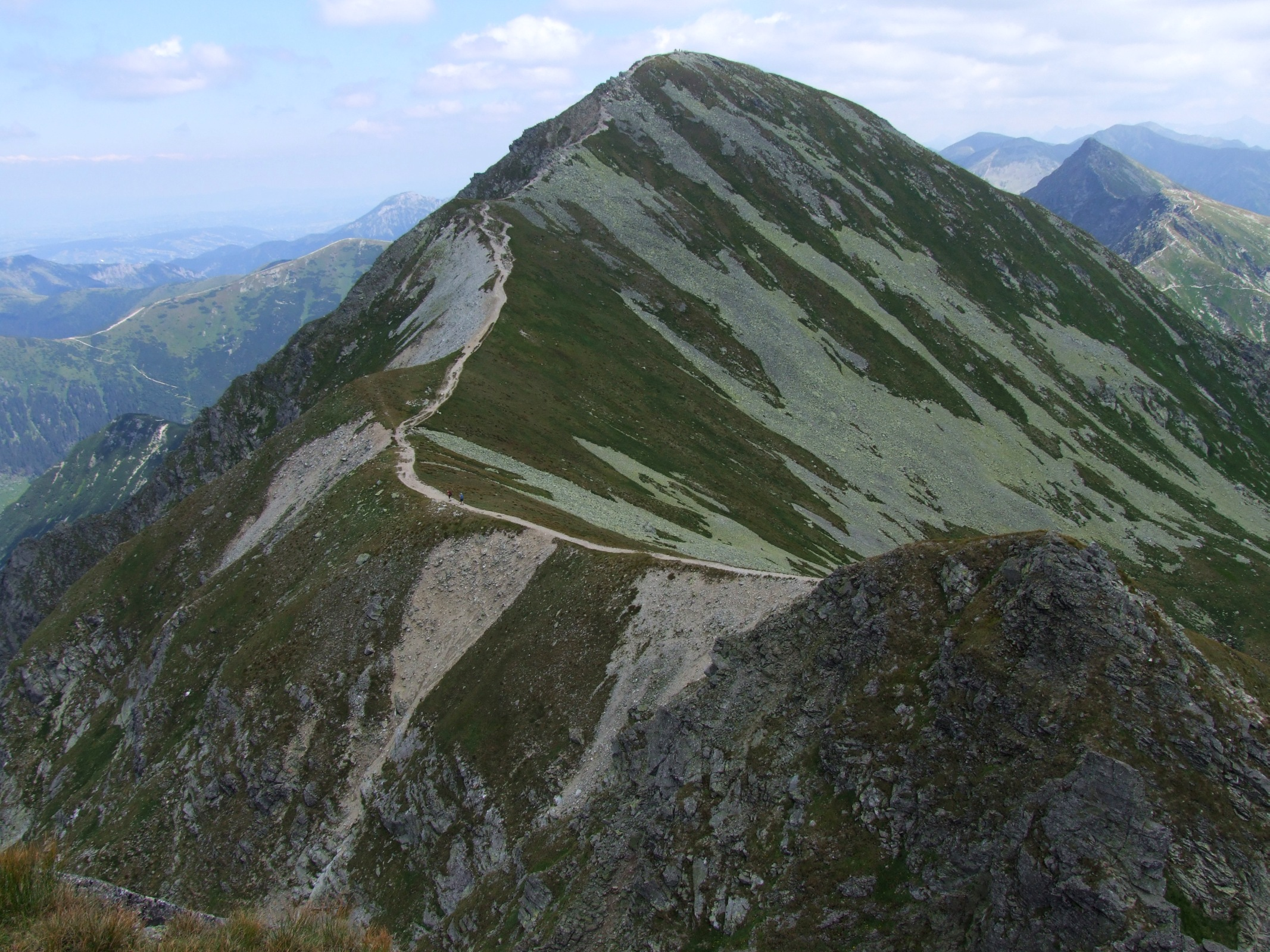 Hruba Kopa (West Tatra Mountains)